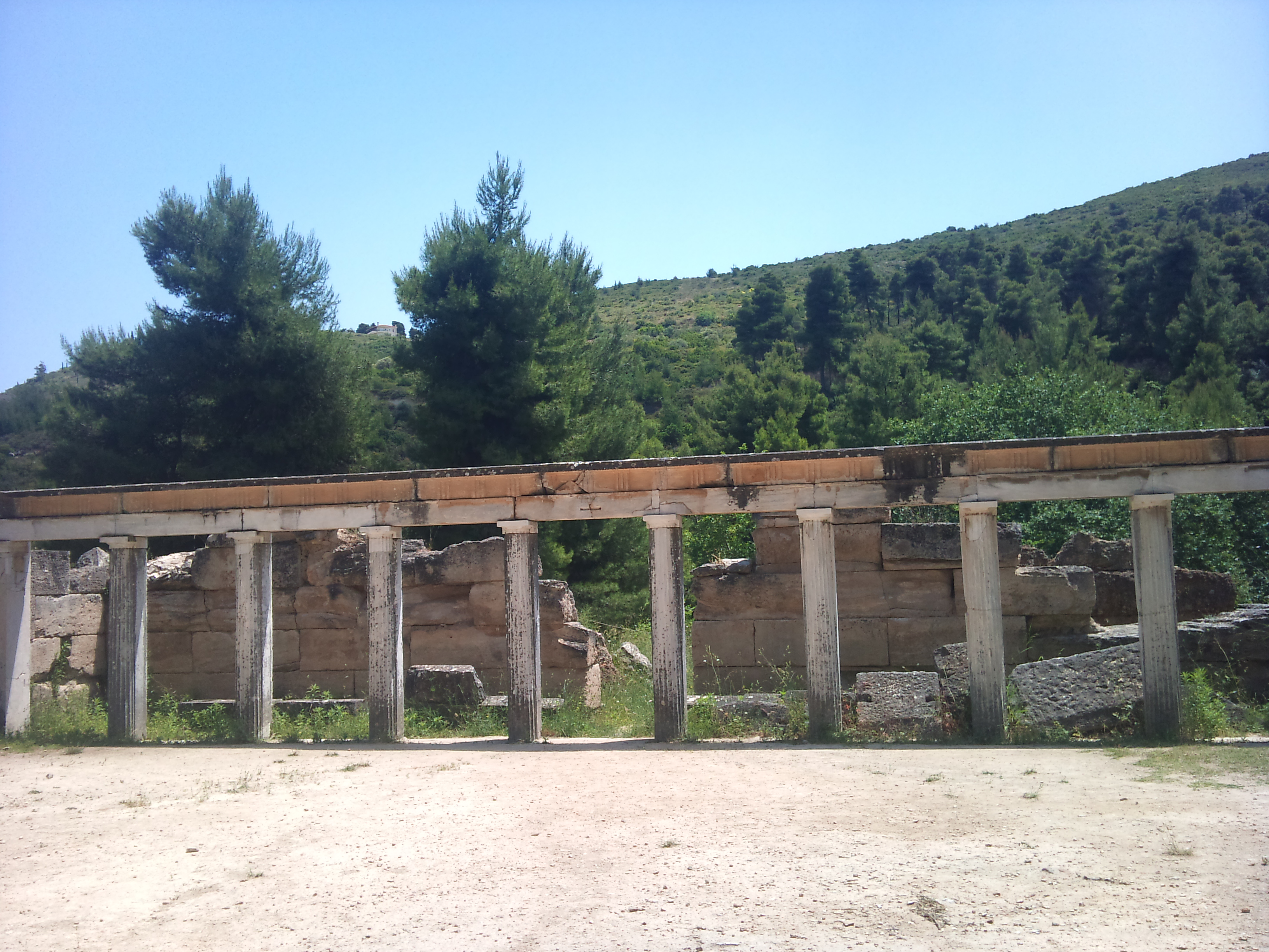 Αμφιάρειο Ωρωπού«Αμφιάρειο Ωρωπού»